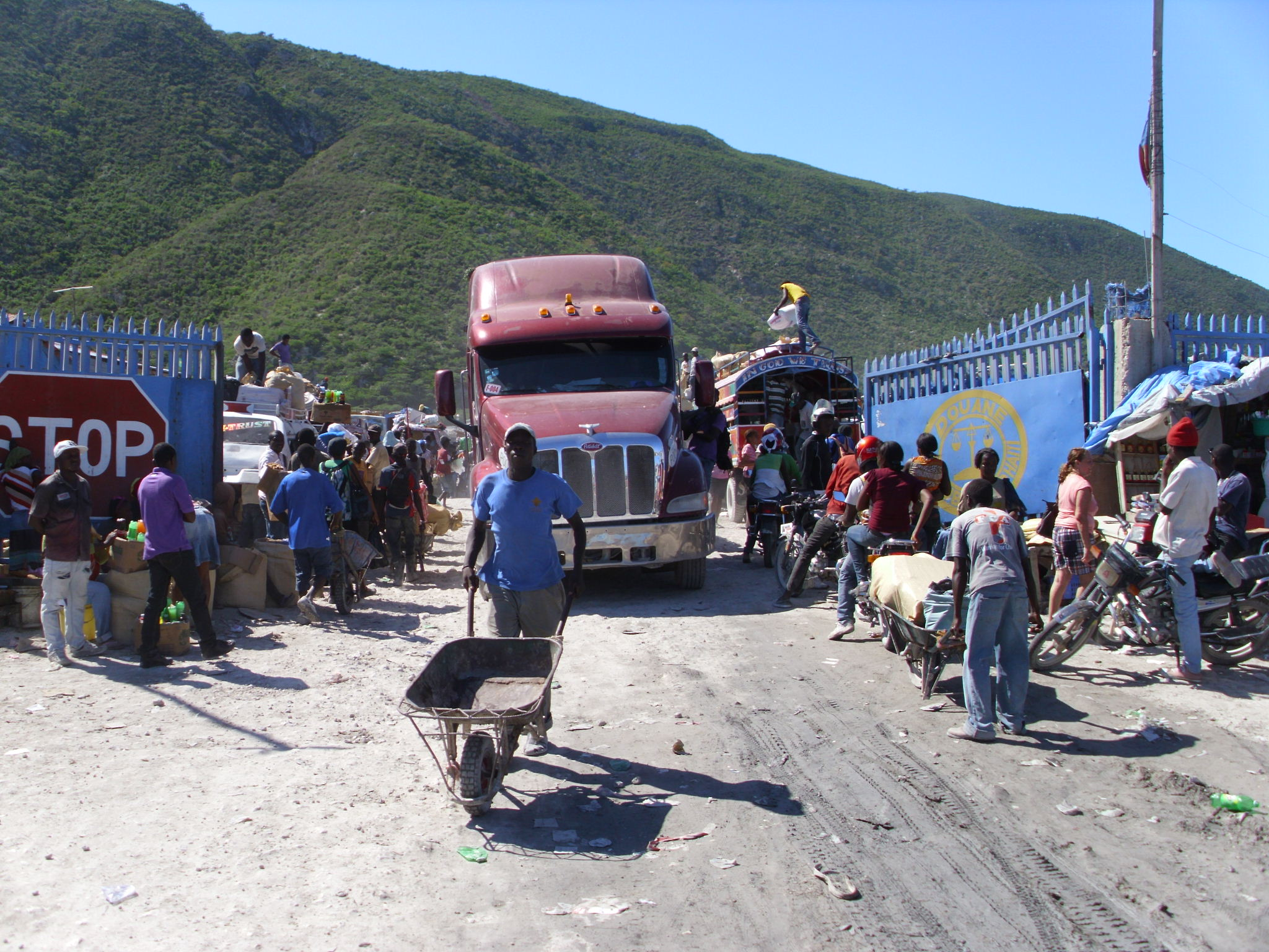 De nieuwe grenspost tussen Haïti en de Dominicaanse republiek bij Jimaní, door de verhoogde waterstand van het meer Étang Saumâtre.